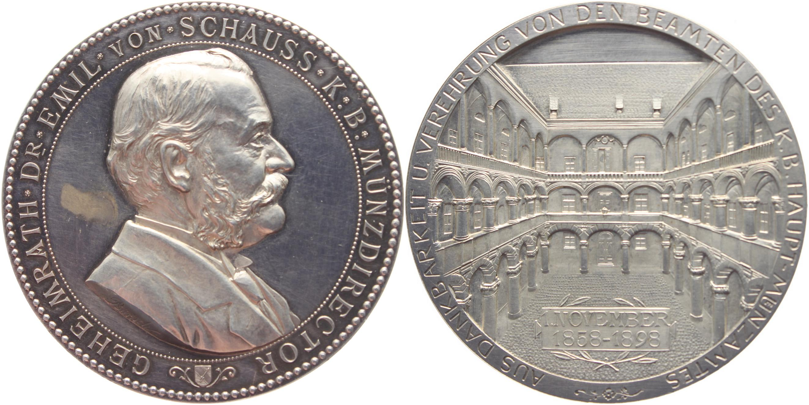 Gedenkmünze der Beamten des Königlich bayerischen Hauptmünzamtes zum 40jährigen Dienstjubiläum von Emil von Schauß